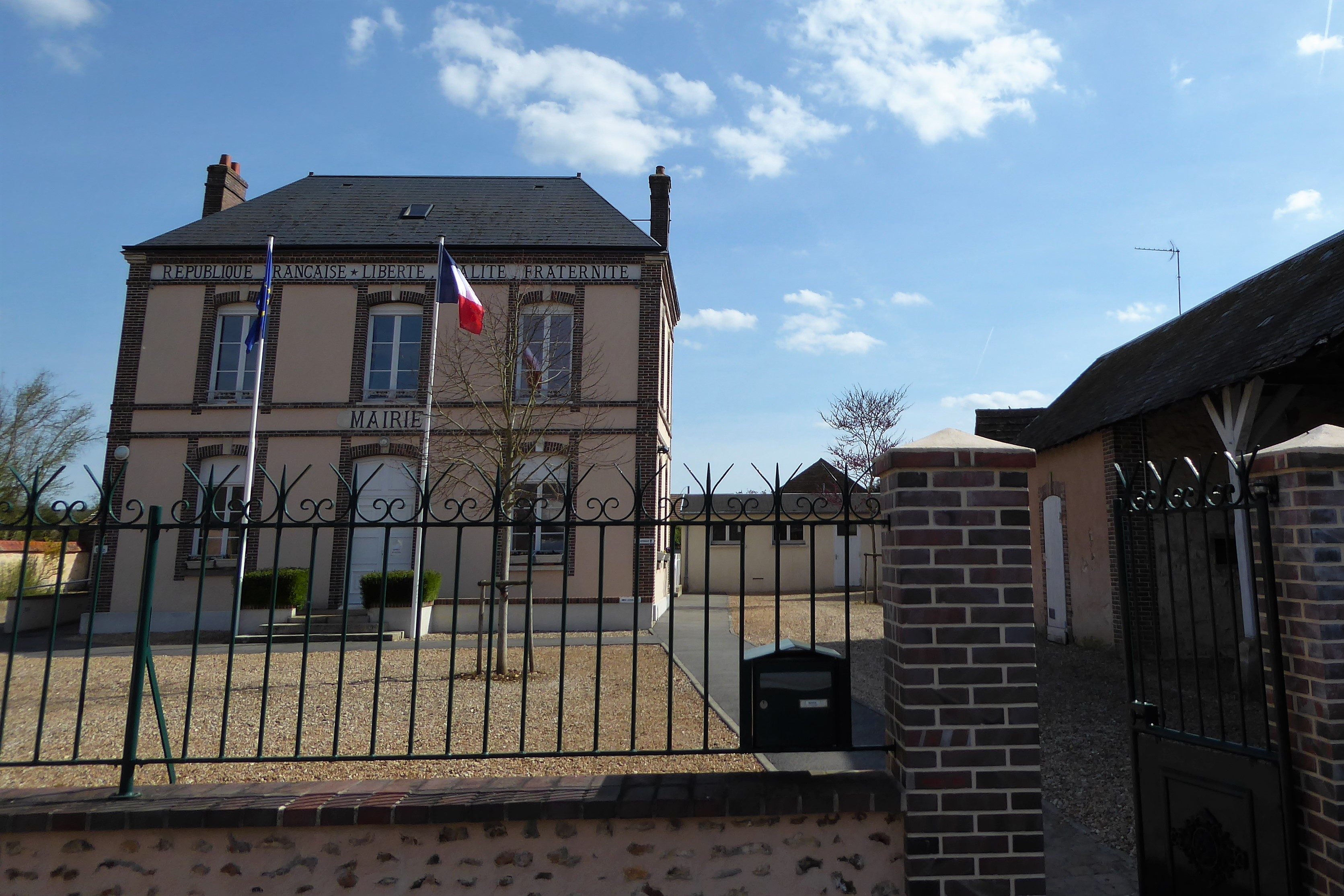 mairie de Saussay, Eure-et-Loir, France.